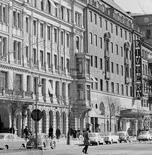 biografen Riviera från Sveavägen, Stockholm